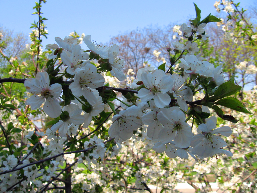 Ейск во воторой половине апреля